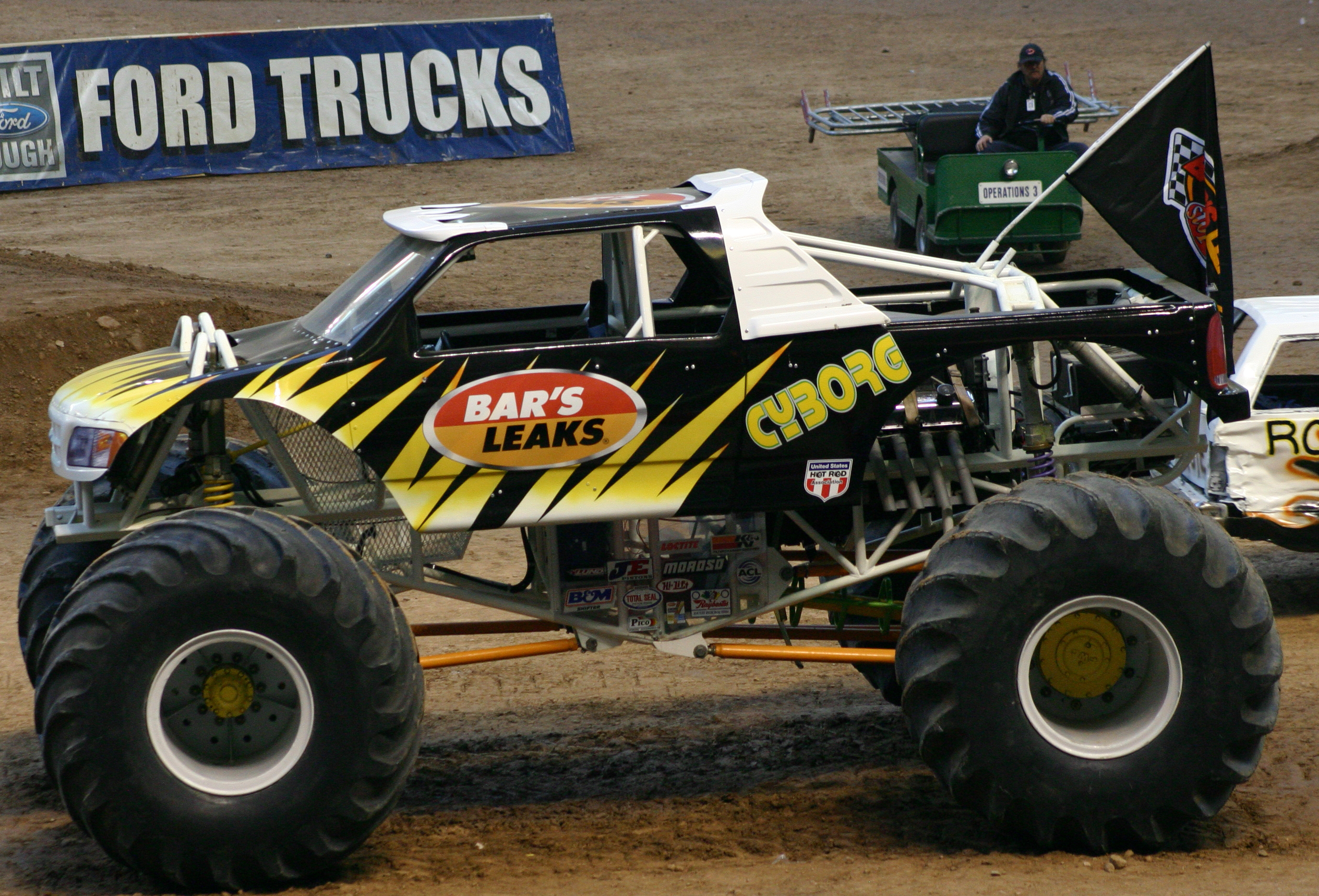 Taken by Jot Powers, 1/2006